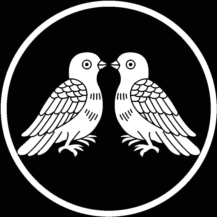 丸に対い鳩